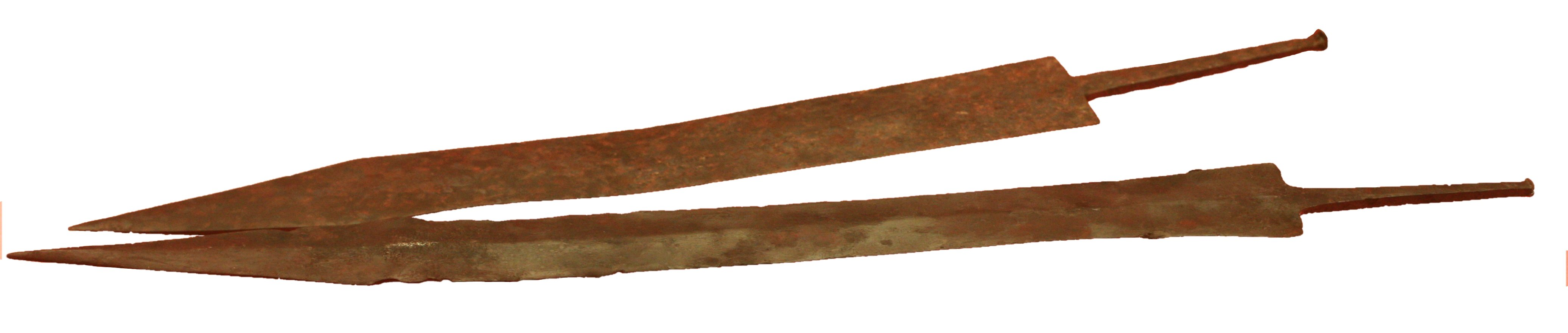 Schwertklingen Gladius Typ Mainz.Oben Variante Fulham, unten Variante Sisak